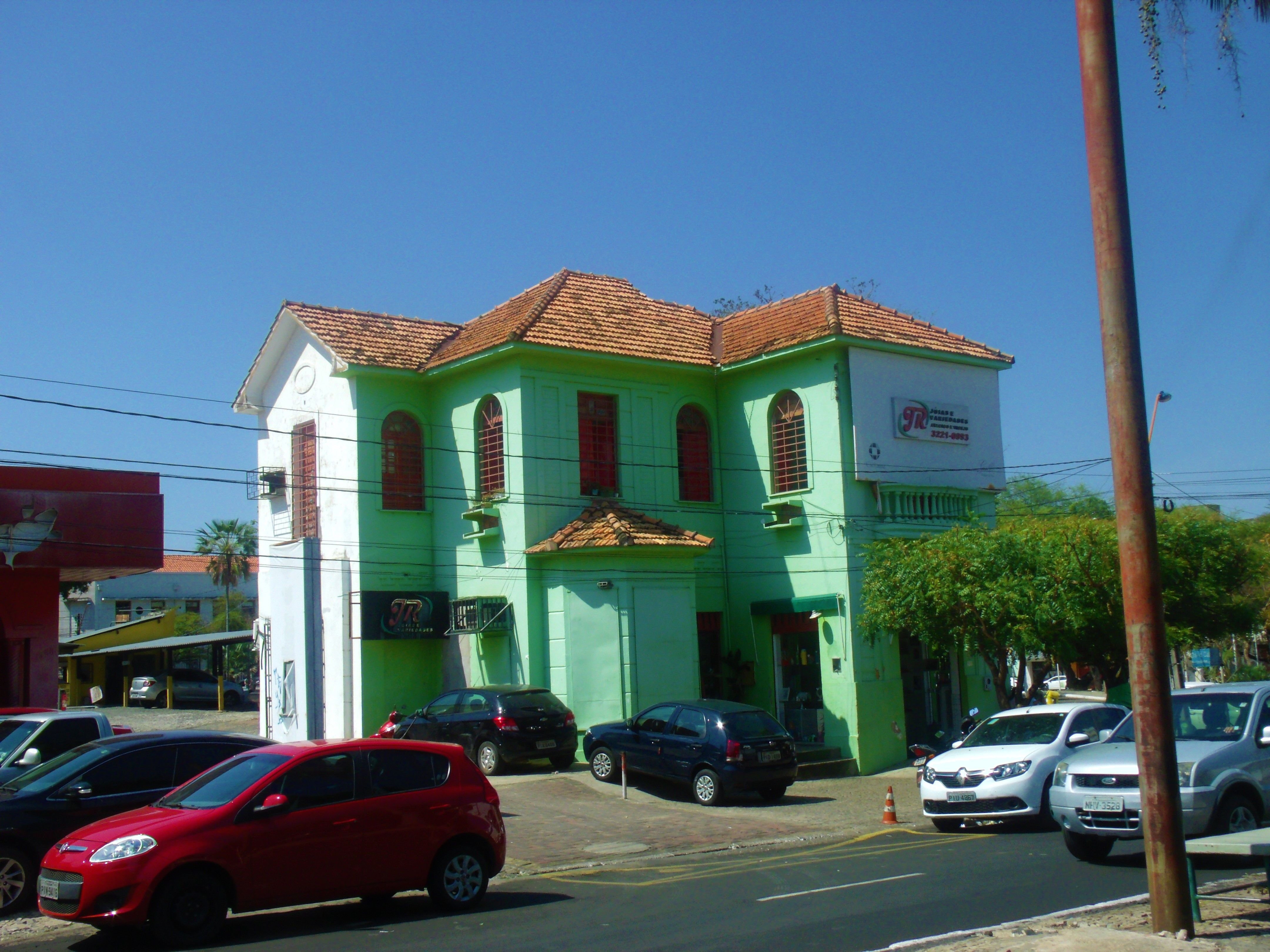 Casa, em Teresina, que foi do deputado federal constituinte de 1934, Francisco Freire de Andrade, fica nos entornos da Praça Pedro II.